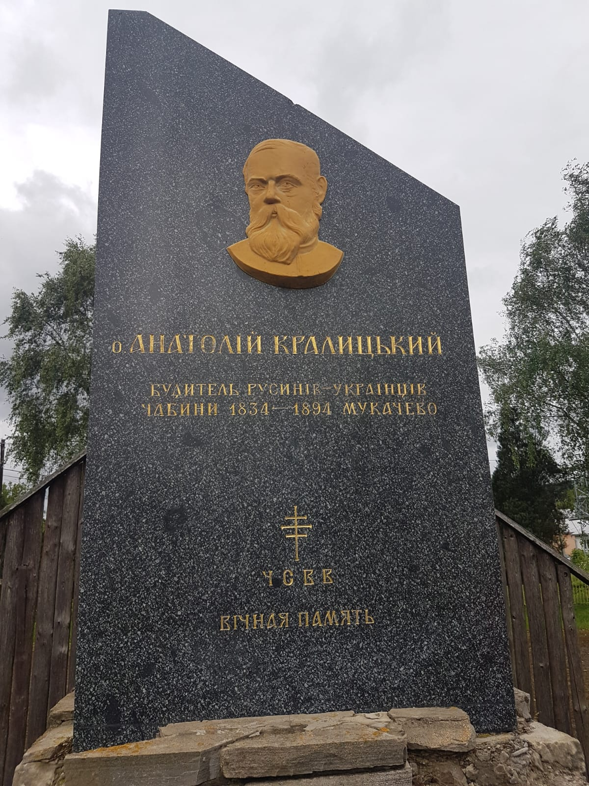 Pamätník Anatolija Kralického sa nachádza v obci Čabiny, kde sa v roku 1835 narodil.